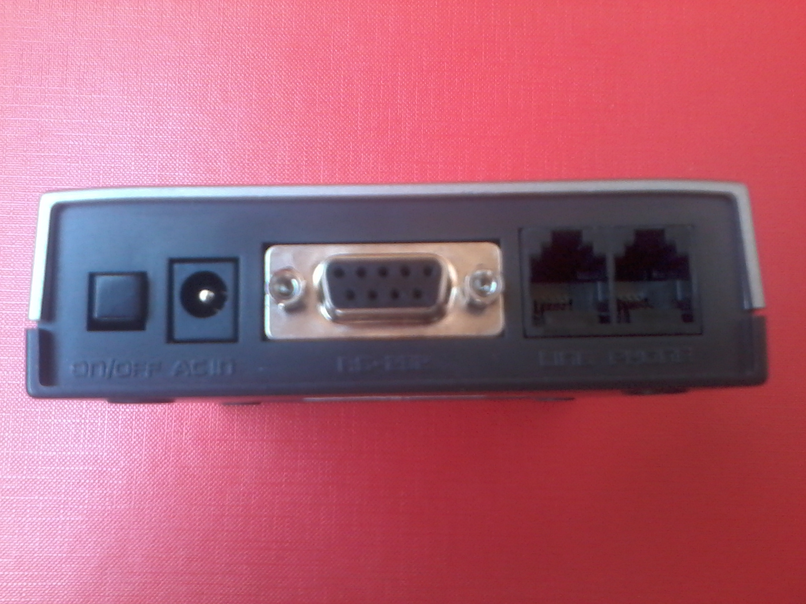 Знято мобілкою Самсунг